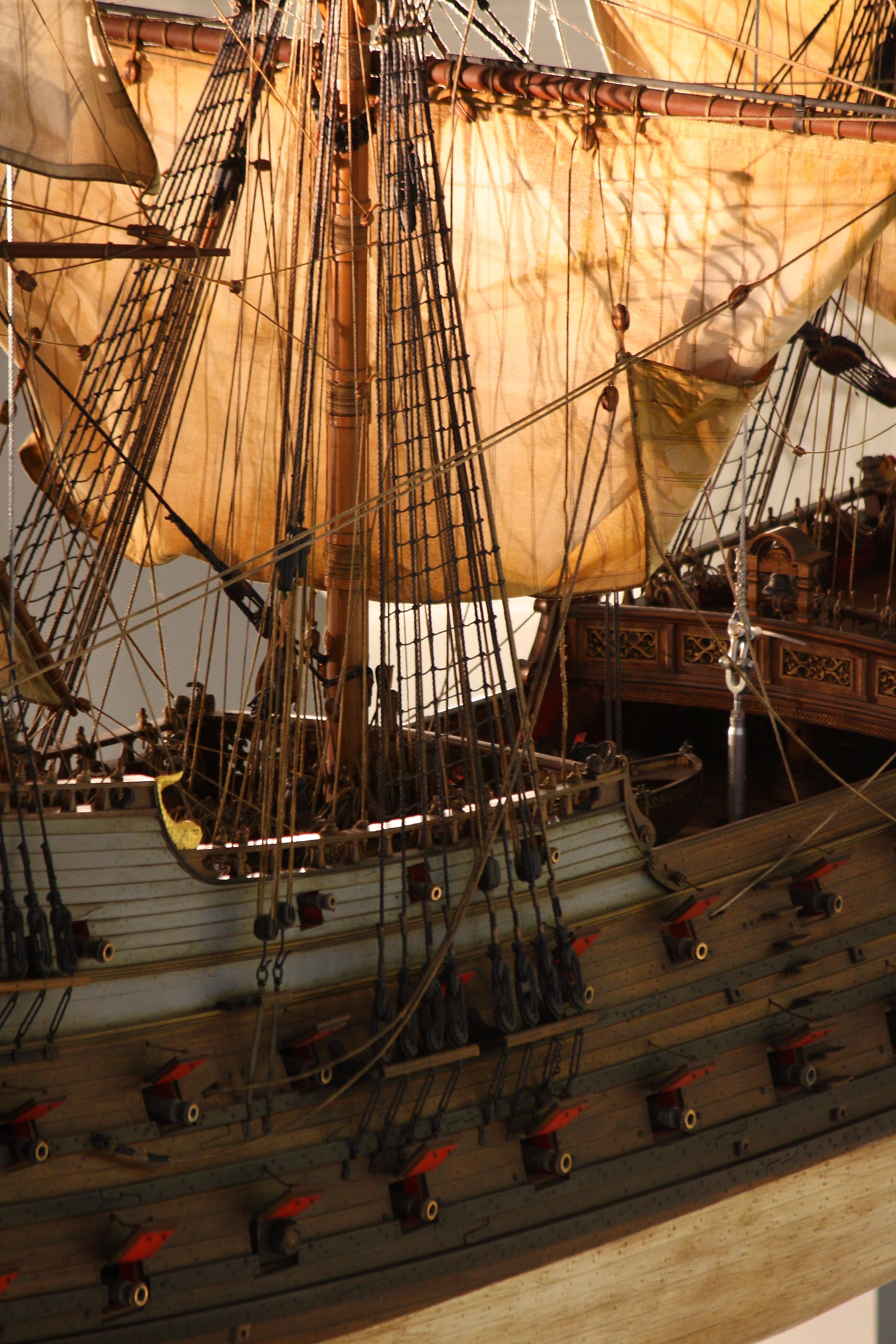 Modell des hamburgischen Konvoyschiffes Leopoldus Primus - Detailansicht Kuhl